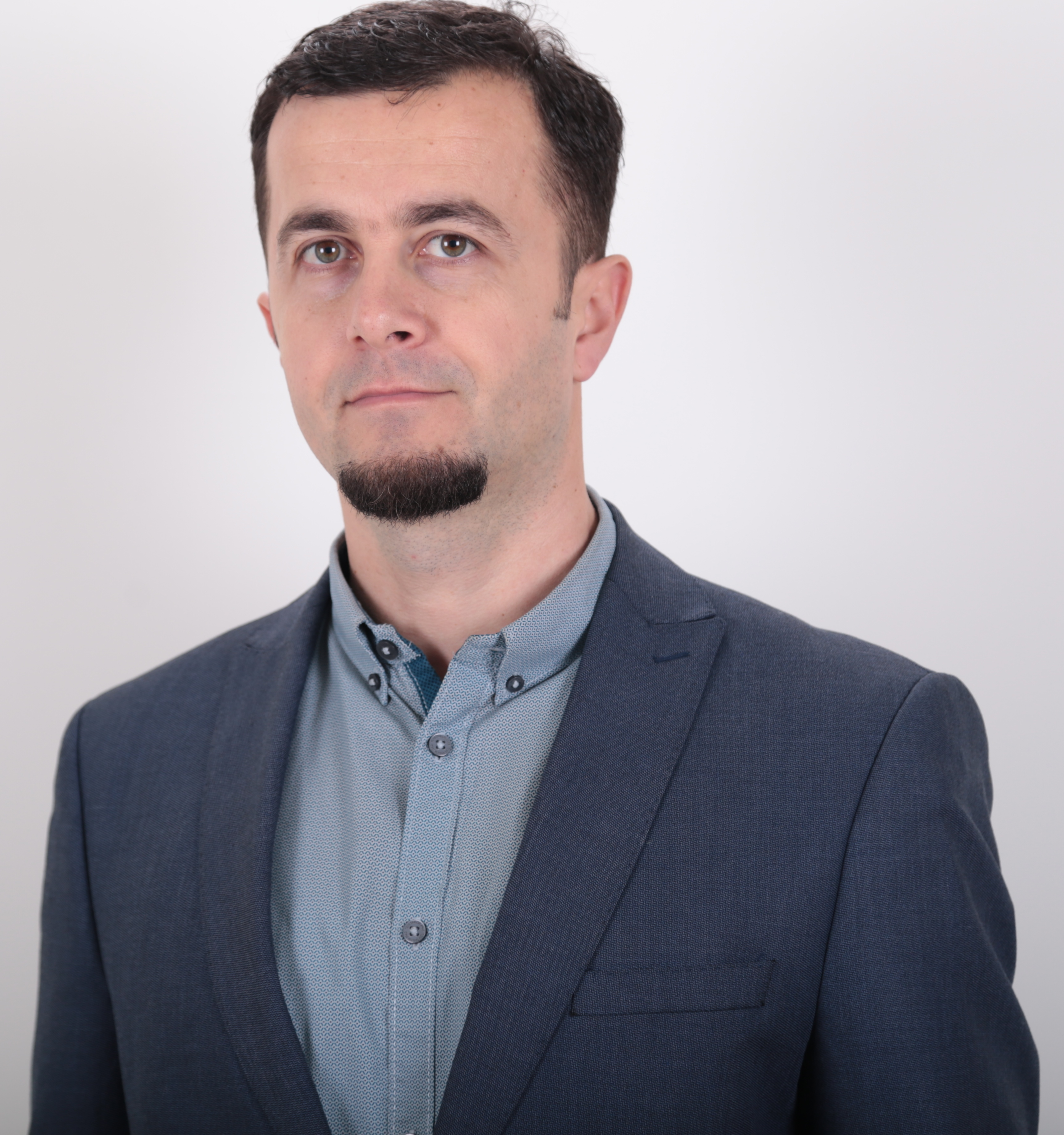 Petrit Ahmeti